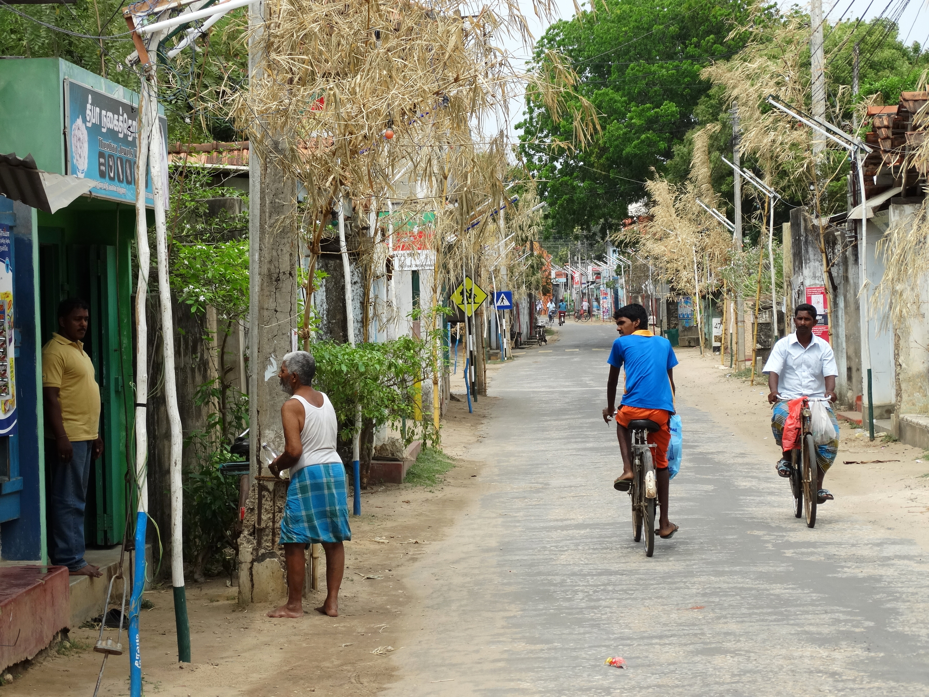 Street Scene - Valvettiturai - Jaffna Peninsula - Sri Lanka